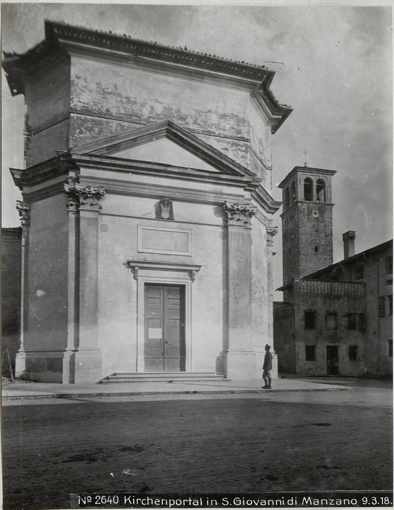 Kirchenportal in S.Giovanni di Manzano 9.3.18.